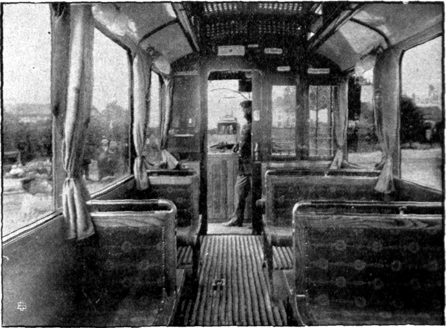 Innenansicht der Wagen der Lübecker Straßenbahn Bahnhof-Marli